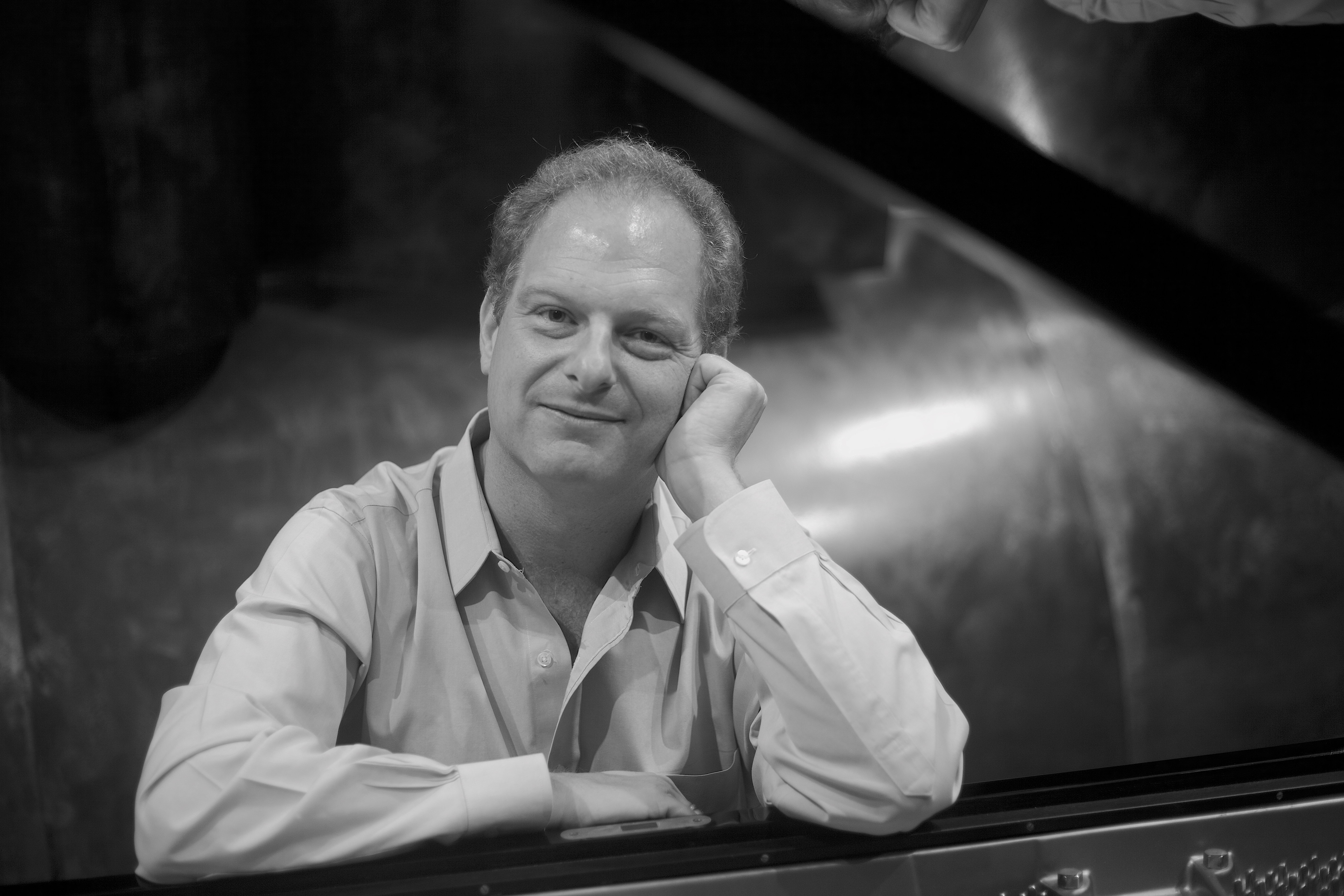 Pianist Javier Lanis